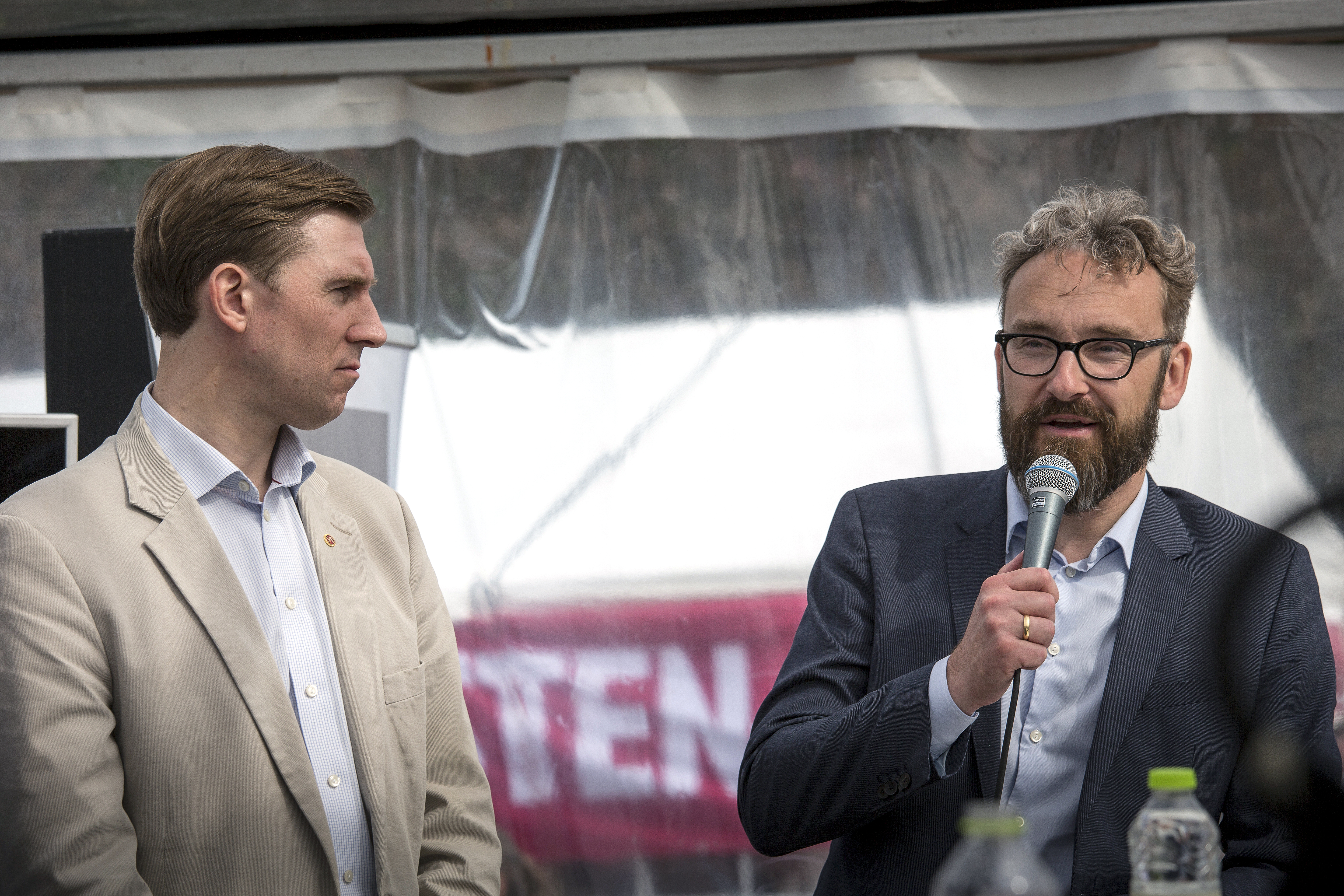 Region Skånes regionstyrelses ordförande Henrik Fritzon (S) till vänster och Danmarks transportminister Ole Birk Olesen (LA) debatterar torsdagen den 15 juni 2017 HH-förbindelsen i Greater Copenhagens tält på Folkemødet i Allinge på Bornholm. De är överens om att att det behövs en fast förbindelse mellan Helsingborg och Helsingör men medan Ole Birk Olesen bara vill ha en biltunnel vill Henrik Fritzon ha både en bil-och en tågtunnel...Photo: News Øresund - Sofie Paisley.© News Øresund - Sofie Paisley (CC BY 3.0).. .Detta verk av News Øresund är licensierat under en Creative Commons Erkännande 3.0 Unported-licens (CC BY 3.0). Bilden får fritt publiceras under förutsättning att källa anges. .The picture can be used freely under the prerequisite that the source is given. News Øresund, Malmö, Sweden.News Øresund är en oberoende regional nyhetsbyrå som är en del av det oberoende dansk-svenska kunskapscentrat Øresundsinstituttet...